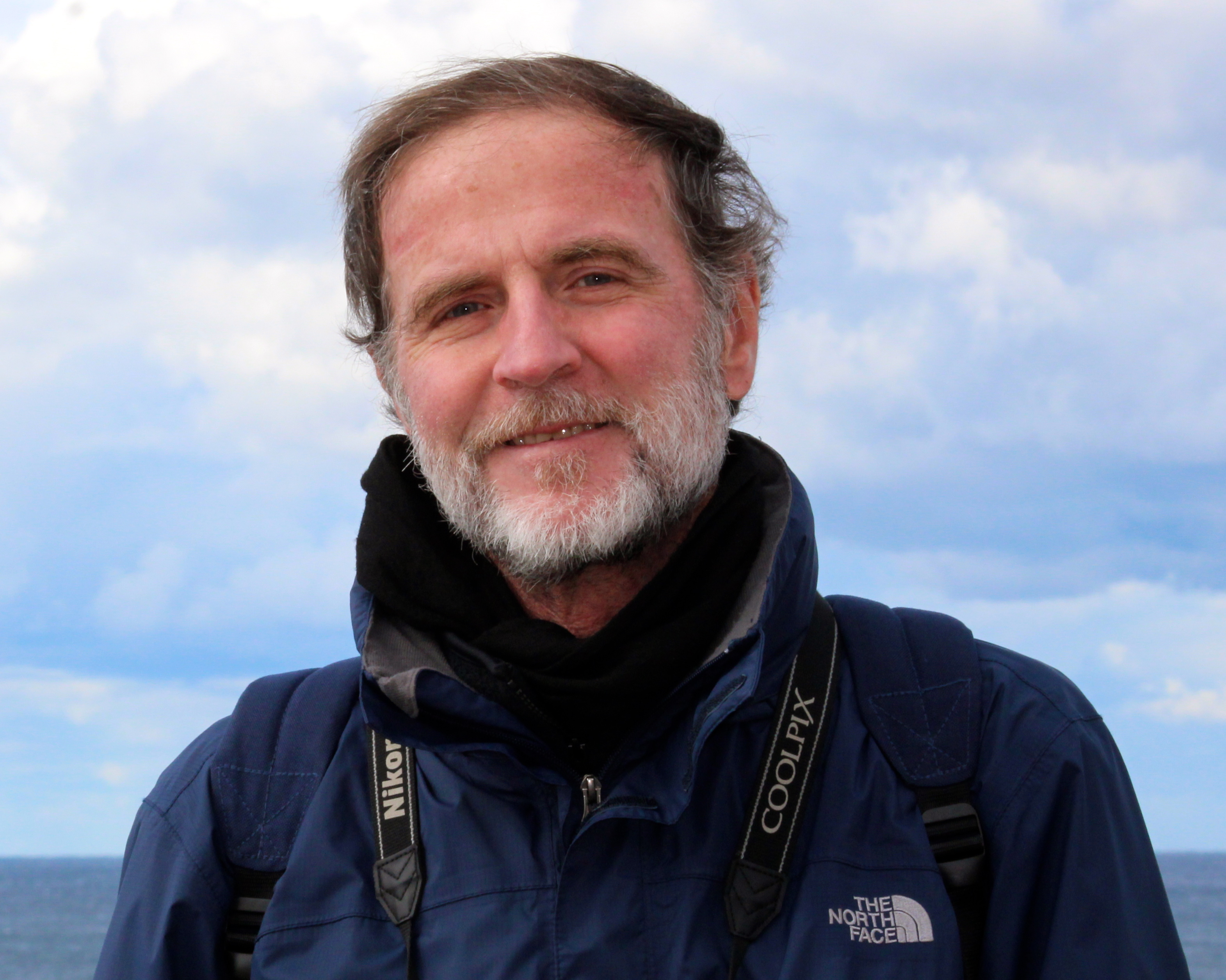 Opera propria